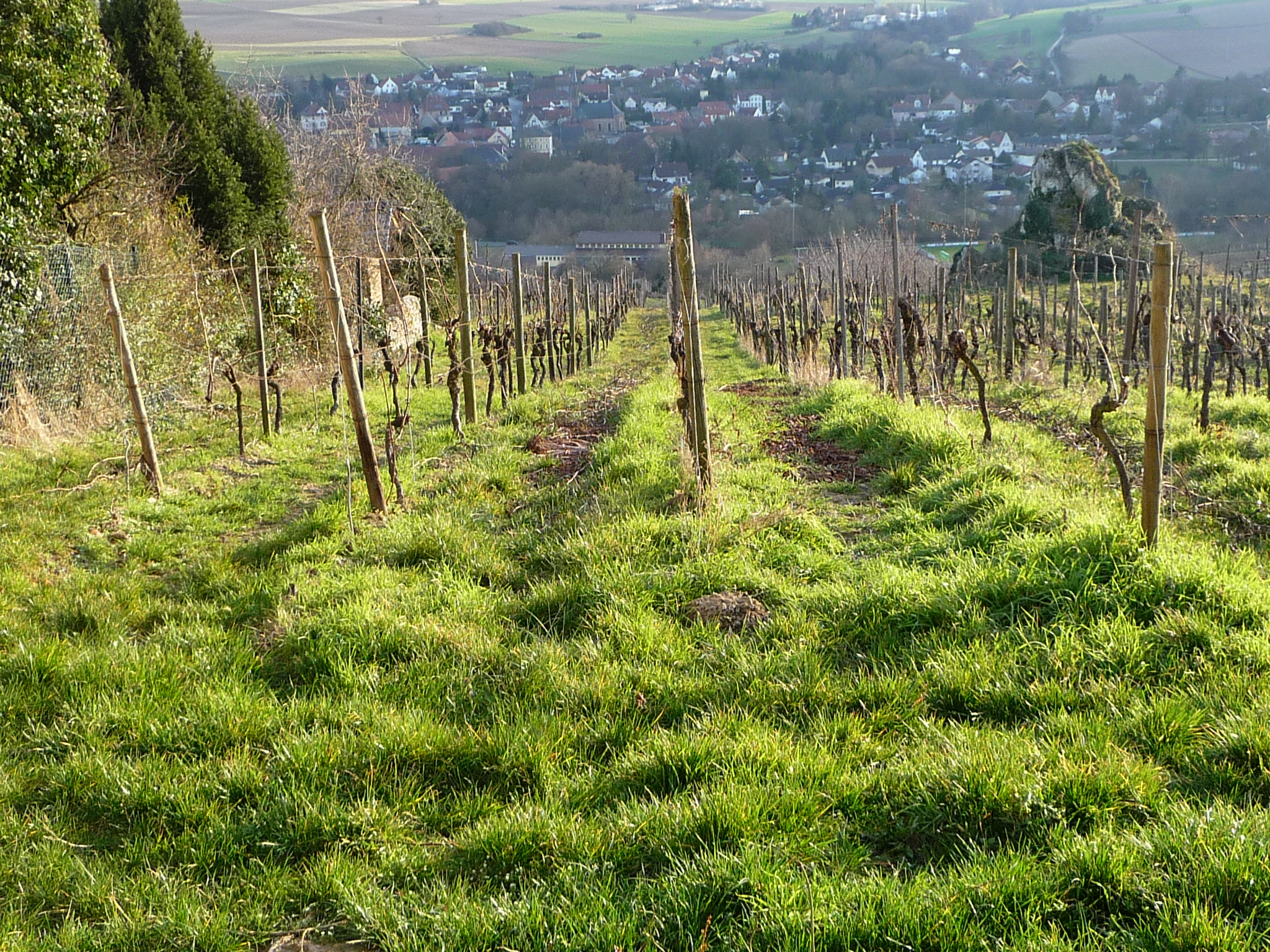 Zell, Ortsteil von Zellertal in Rheinland-Pfalz